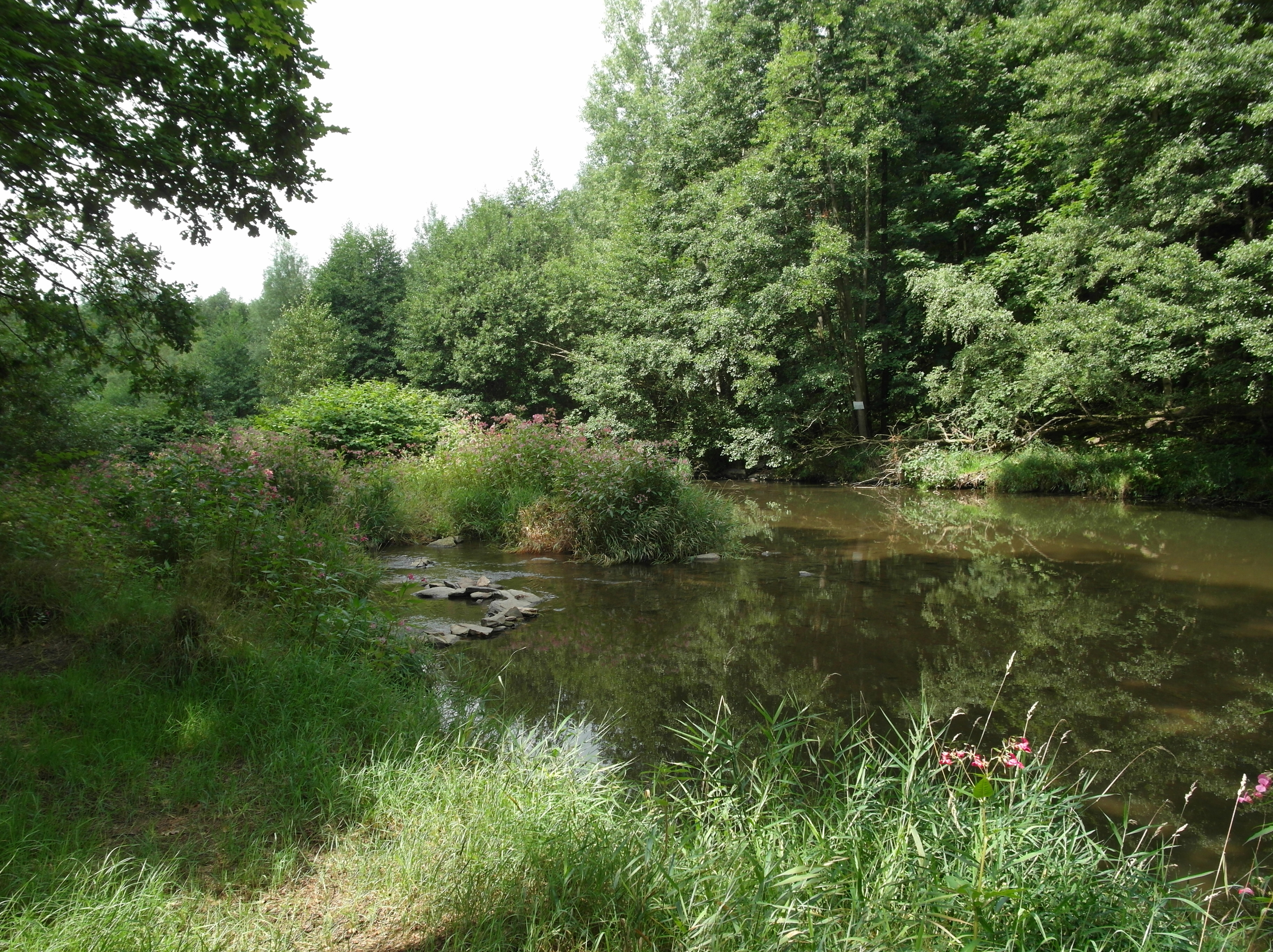 06.08.2017 09599 Halsbach / Neuhilbersdorf (Freiberg). Die Freiberger Mulde im Gebiet der einstigen Papiermühle Oberes Muldental 1, 5, 7 (GMP: 50.918935,13.380117). In der zweiten Hälfte des vorigen Jahrhunderts war dies im Raum ab Weißenborn ein geschundener Fluß, eine Kloake die schaumbedeckt derart stank, daß man sich an seinen Ufern nicht aufhalten mochte. Jetzt ist hier wieder ein kleines Paradies. [SAM1311.JPG]20170806340DR.JPG(c)Blobelt